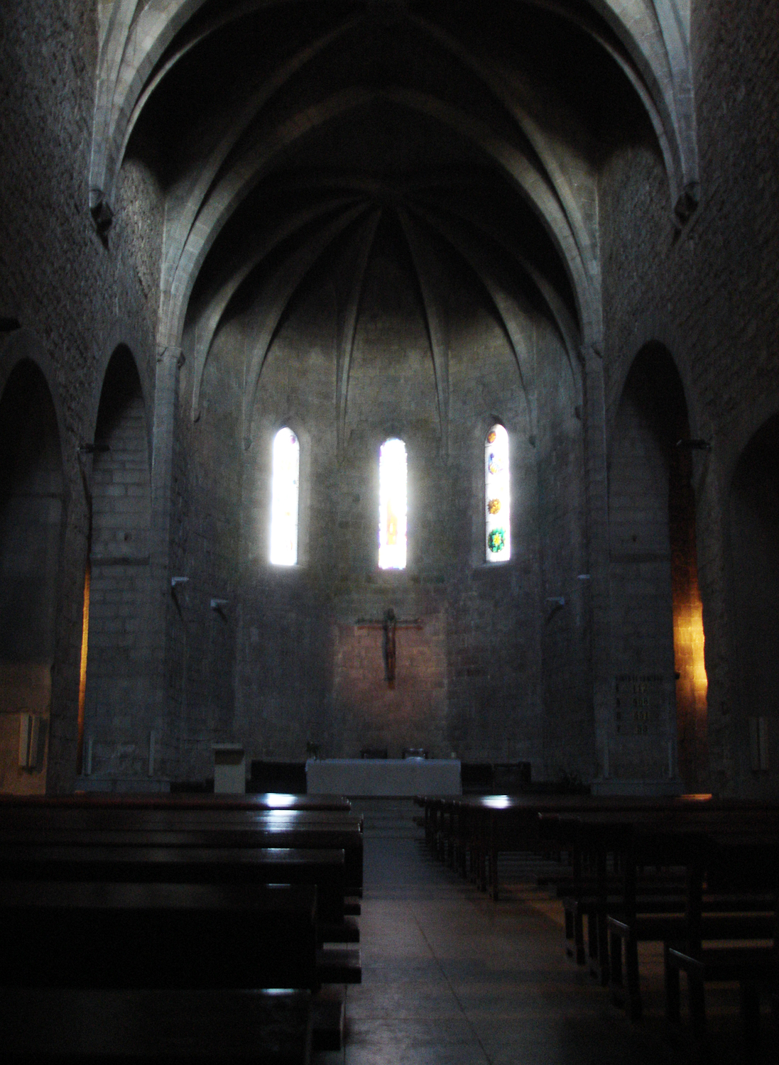 Monestir de Sant Feliu de Guíxols (Girona, Catalunya, Espanya) - Volta gòtica y absis central